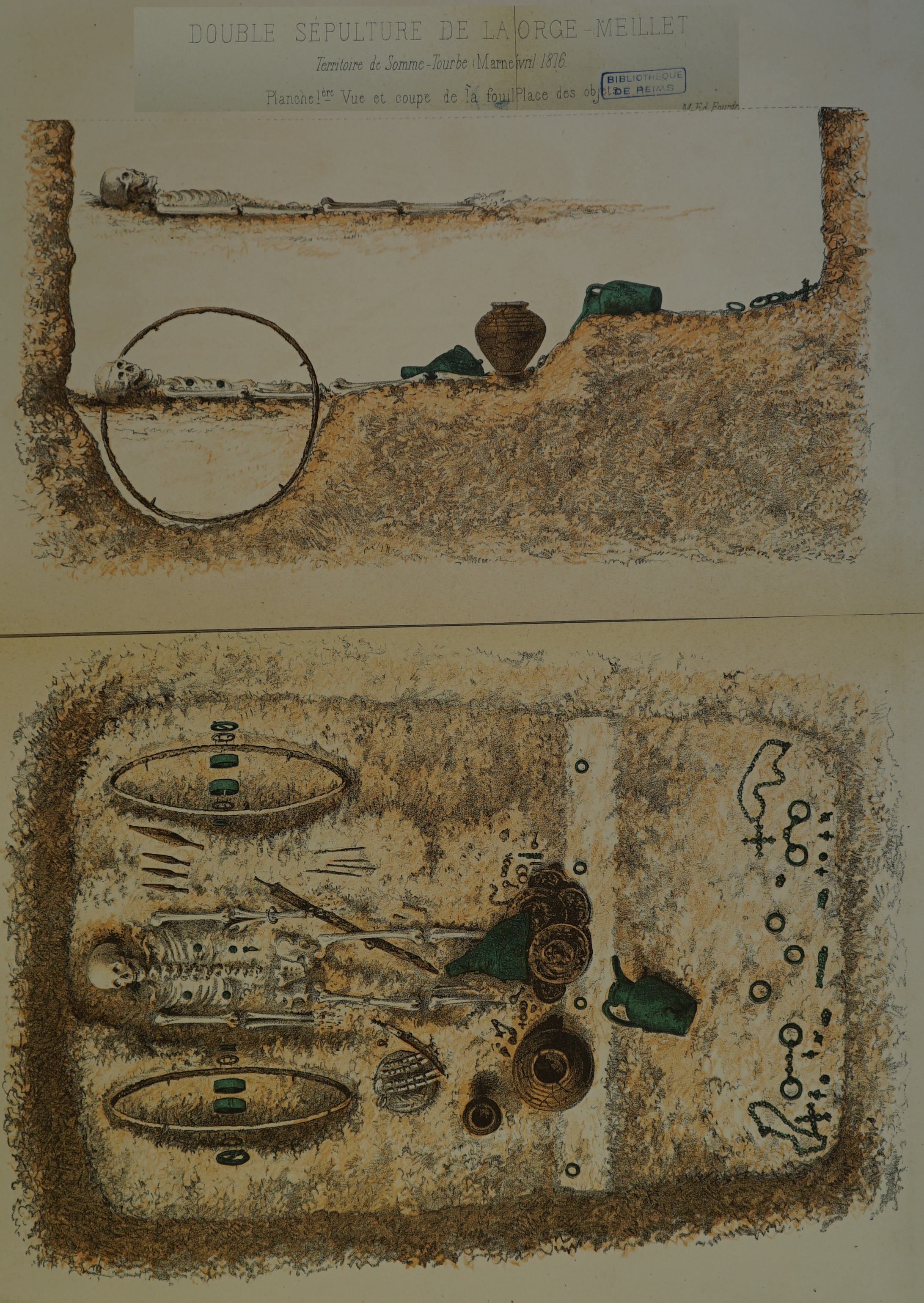 tombe princière issu des fouilles de Fourdrignier en 1875-76 à somme tourbe déposé au Musée d'archéologie national.